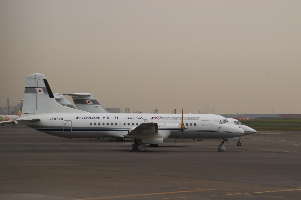 元Jacの機体の側には、寄り添うように国土交通省航空局のYs-11(Ja8709)が駐機していた。こちらもまもなく引退する。